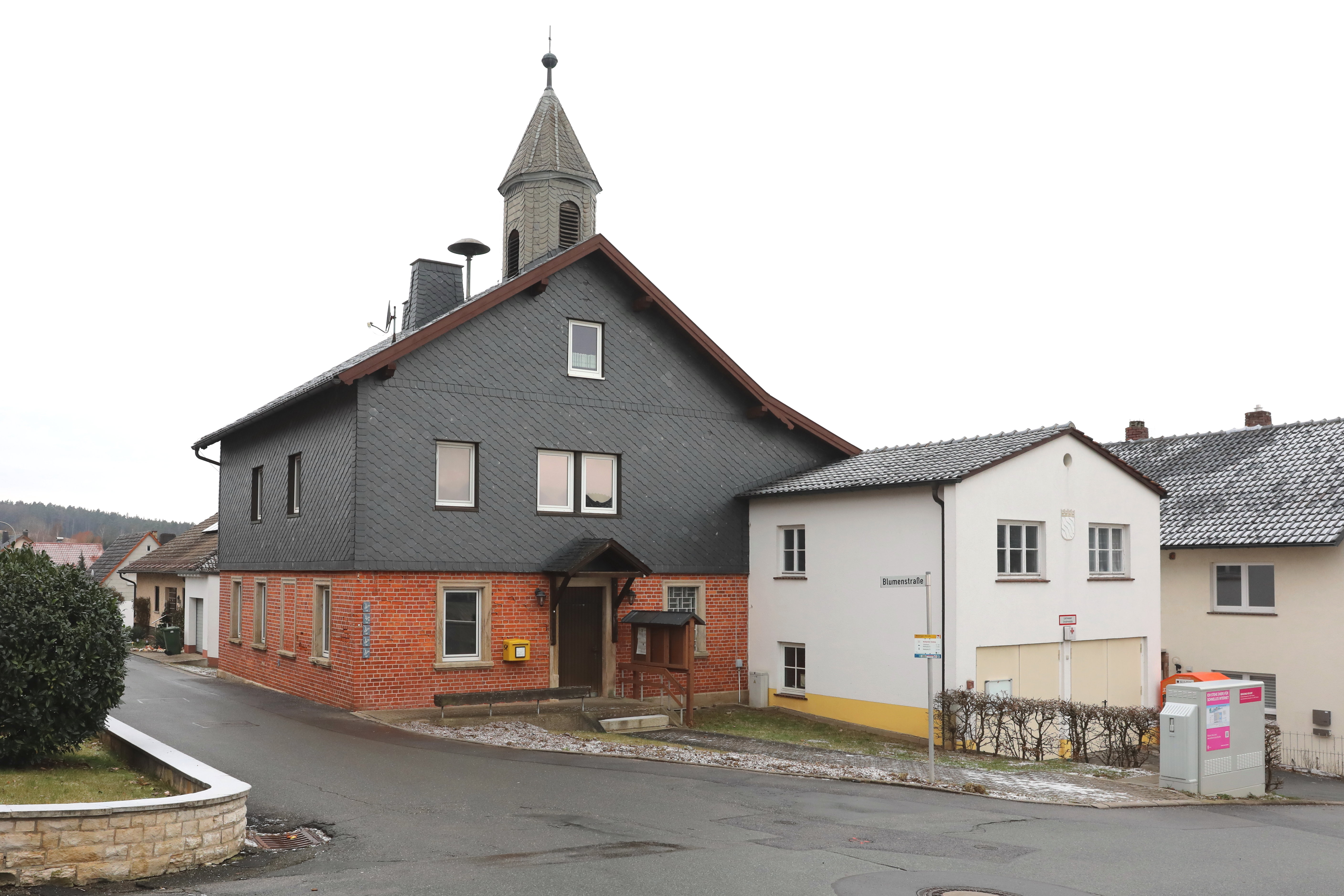 Ehemalige evangelische Schule später Gemeindehaus in Schneckenlohe